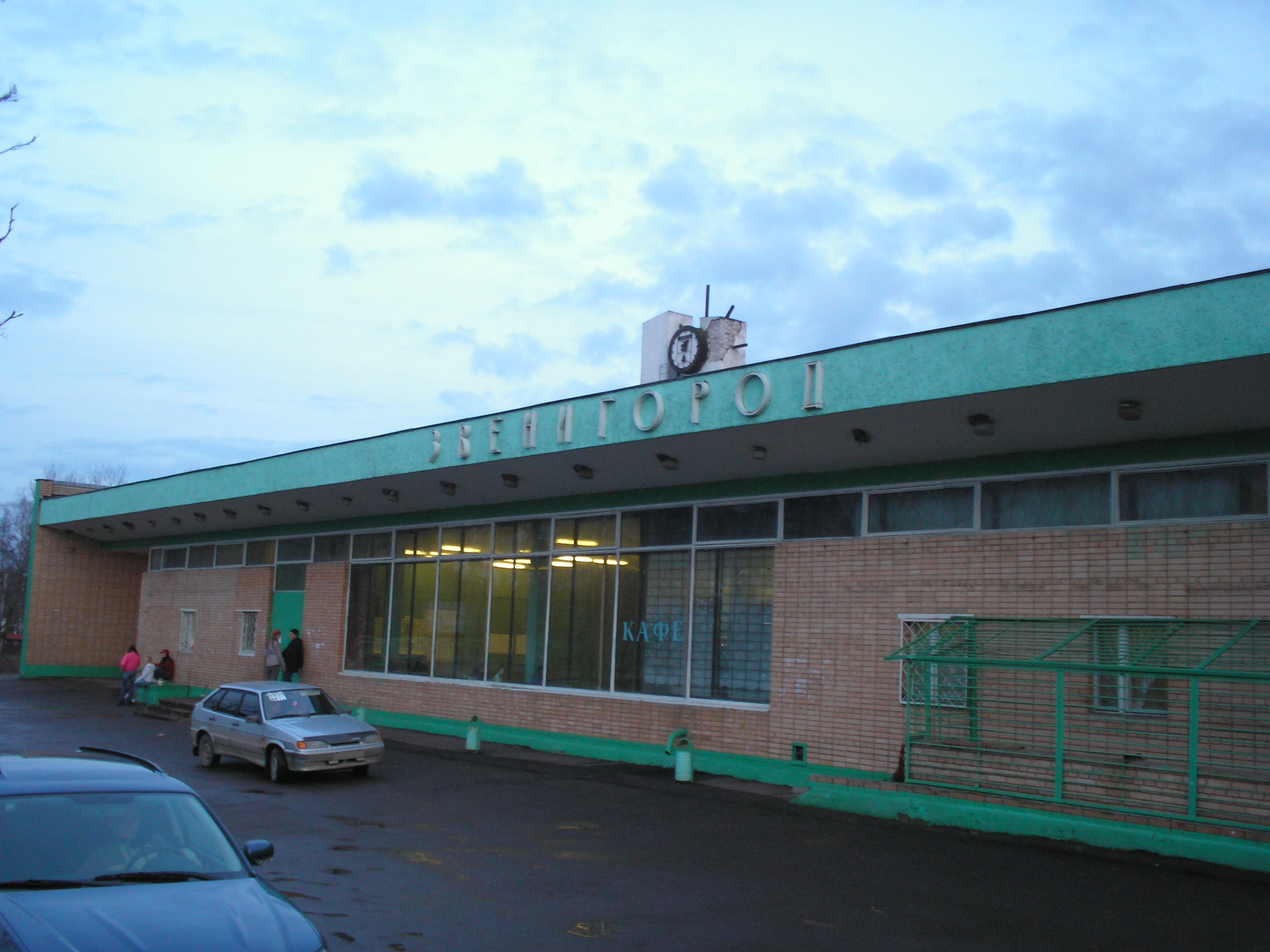 Swenigorod Bahnhof